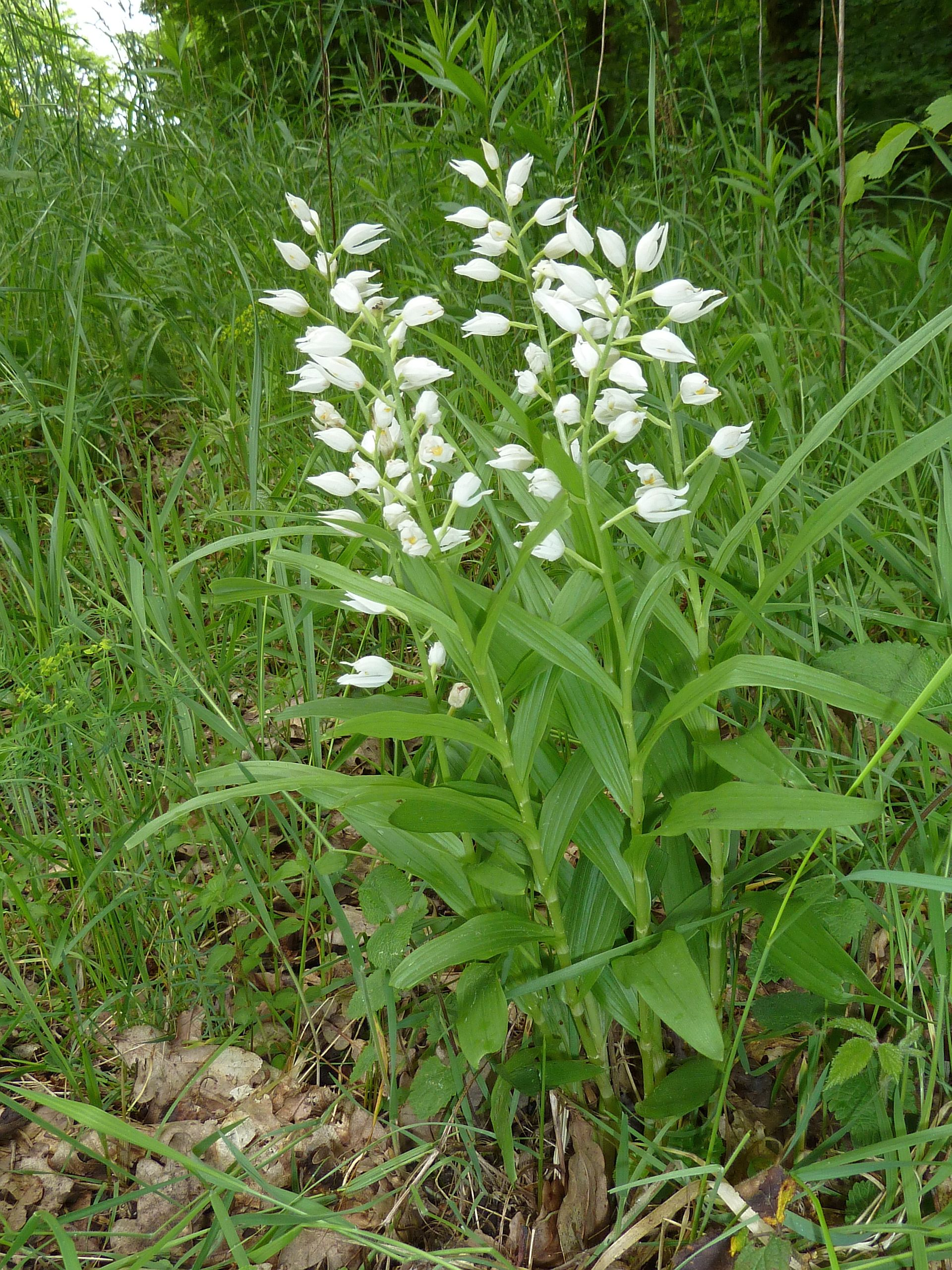 Langblättriges Waldvöglein(Cephalanthera longifolia), Durmersheim (bei Karlsruhe), 20.05.2013